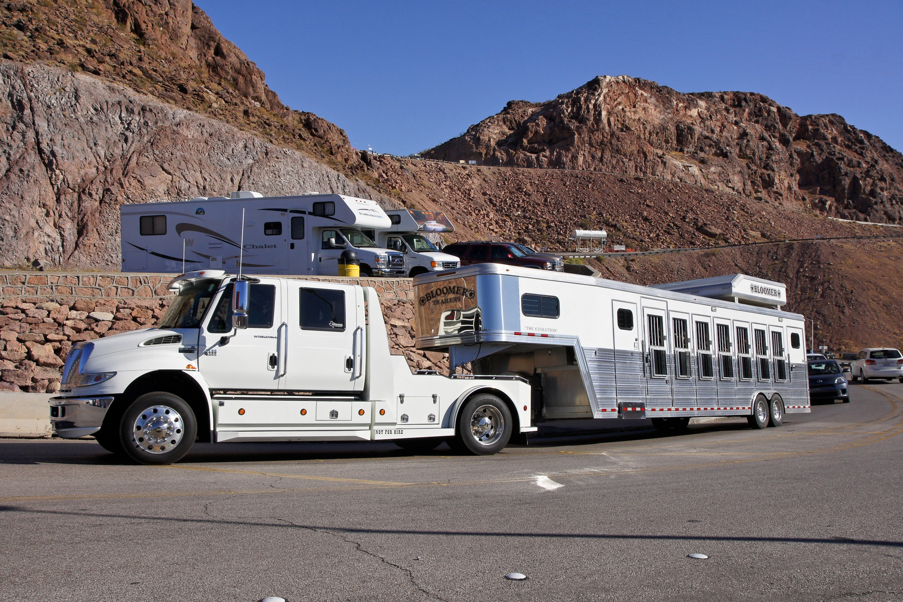 Un camion américain